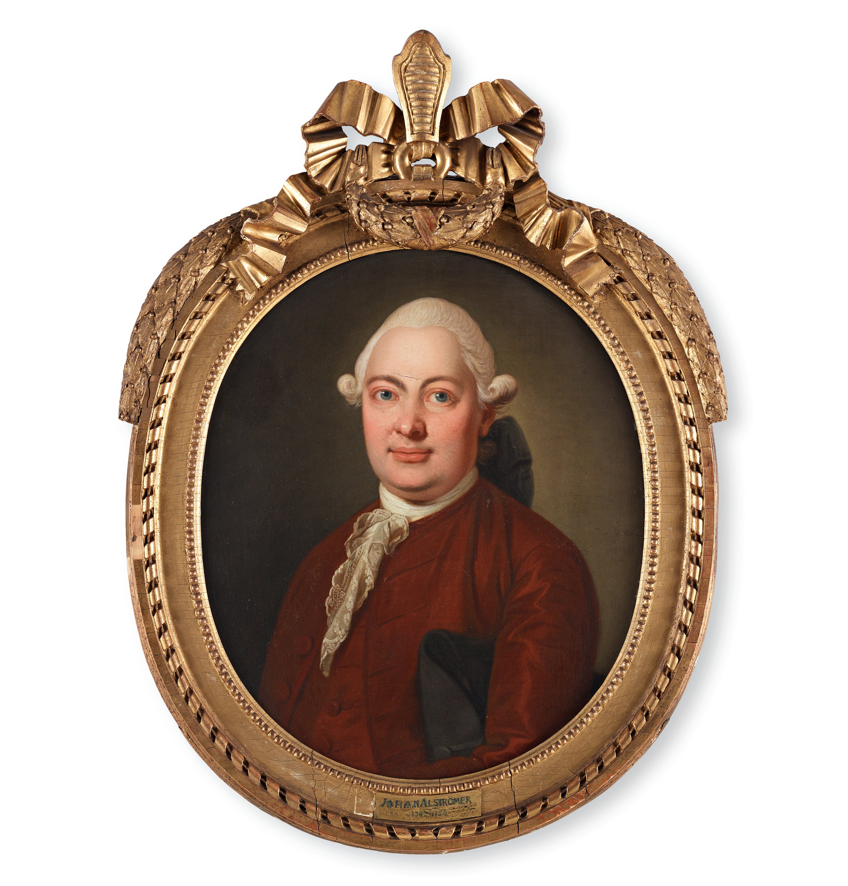 Johan Alströmer (1742-1786) avporträtterad iklädd röd dräkt, med en svart tricorne under höger arm. Porträttet troligen från 1770-talet av Per Krafft d.ä.